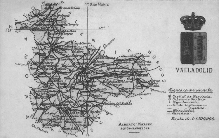 Recuerdo - Valladolid - Colección Valladolid, postales para el Recuerdo, editada por el Diario El Mundo de Valladolid. Postal-recuerdo, con mapa de la provincia y escudo. - Fotografía. Papel 140 x 90 Color